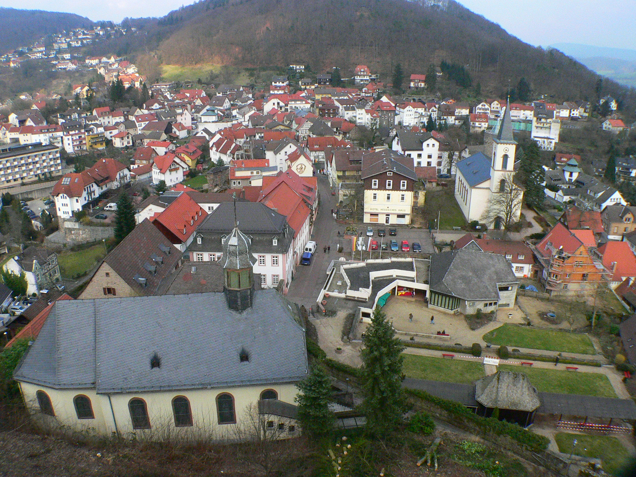 Ortsansicht von Lindenfels, Odenwald, Hessen